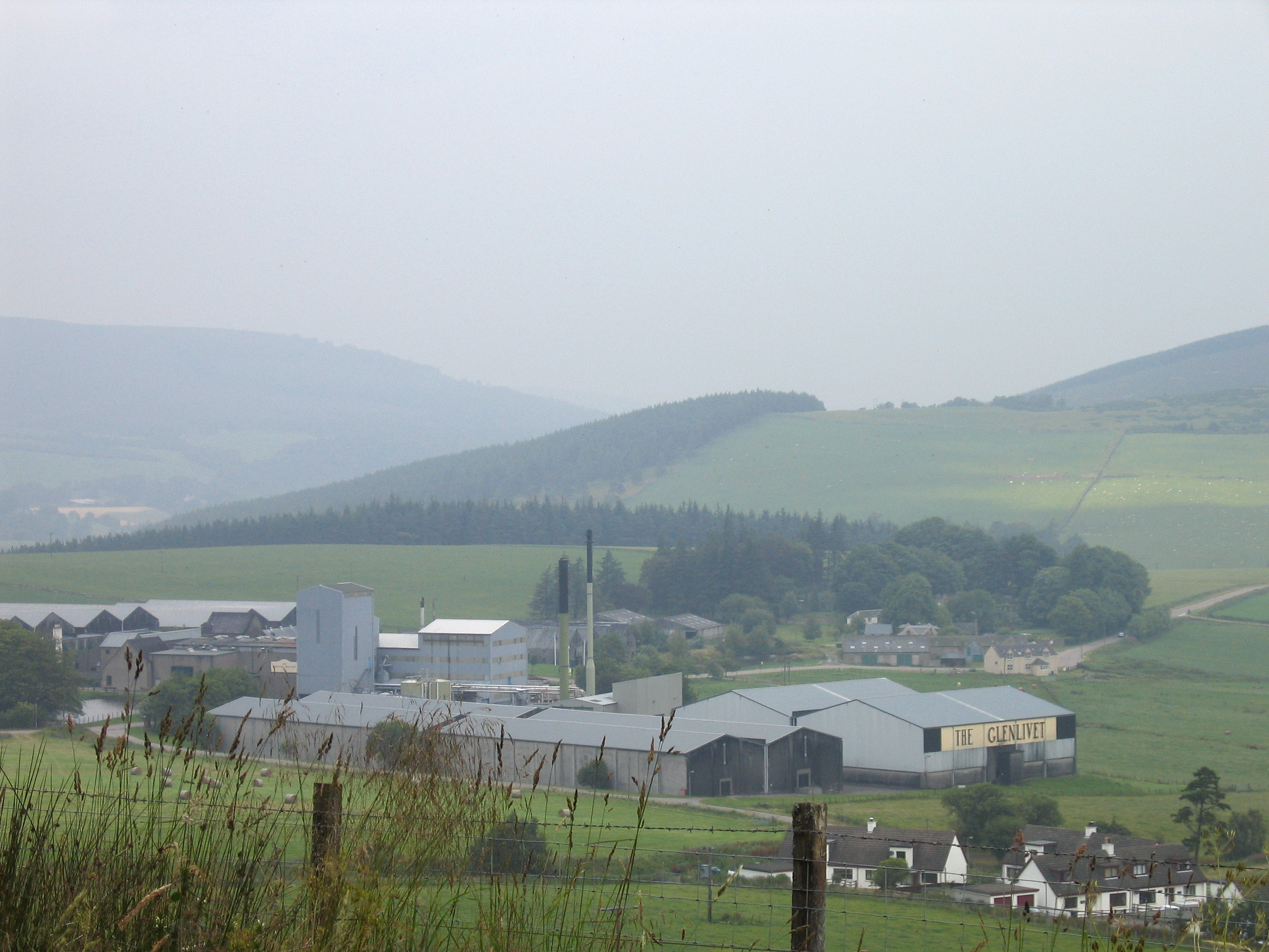 The Glenlivet distillery